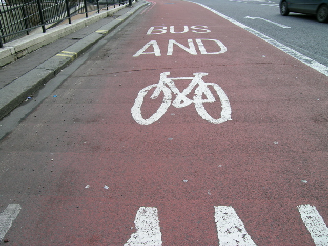 Marquage de sol en anamorphose de voie pour bus et vélo : Bus and "bike" lane. Photo de Dominique Antony, Londres 2006